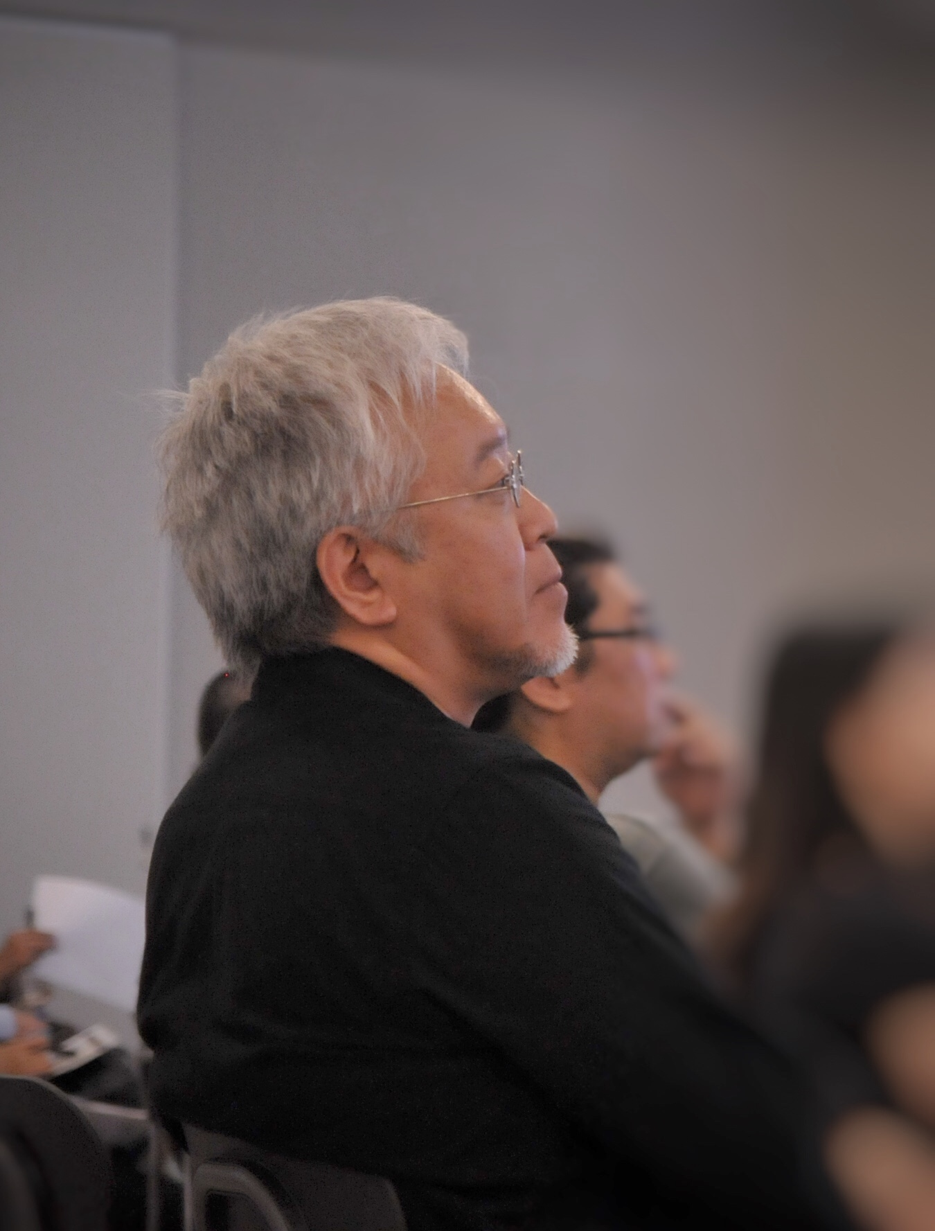 Kenya Hara at POLYLOGUE, Nippon Design Center